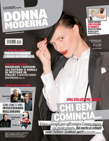 Copertina della rivista Donna Moderna 6 gennaio 2010, Arnoldo Mondadori Editore.